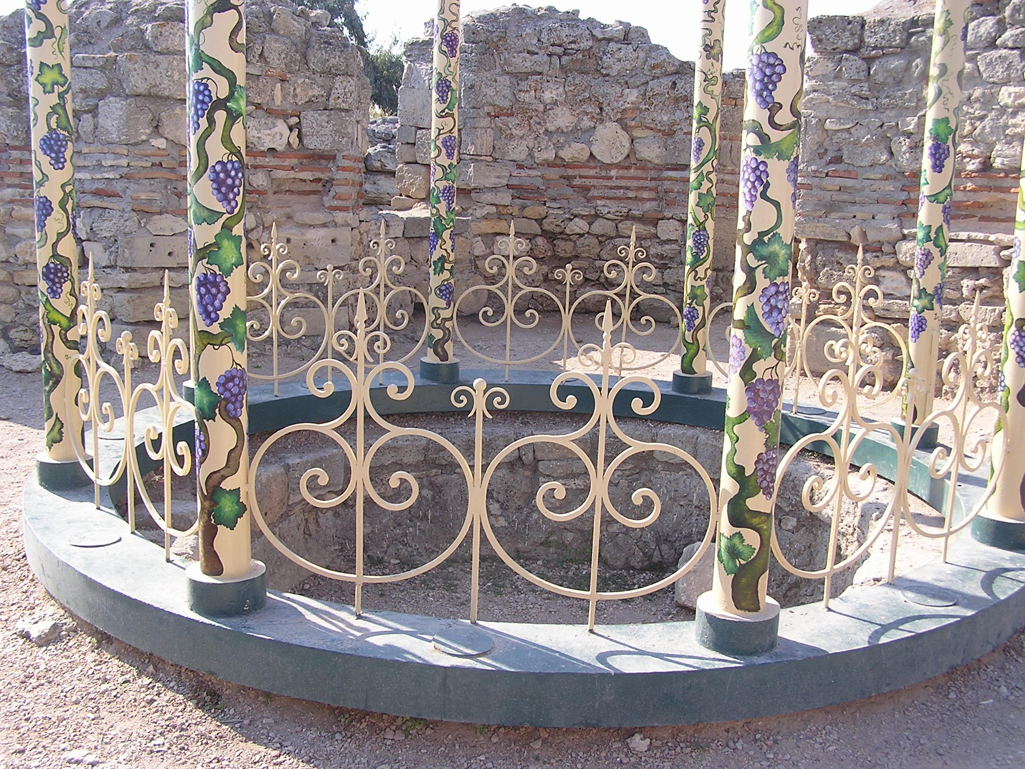 Херсонес. Баптистерий с ротондой